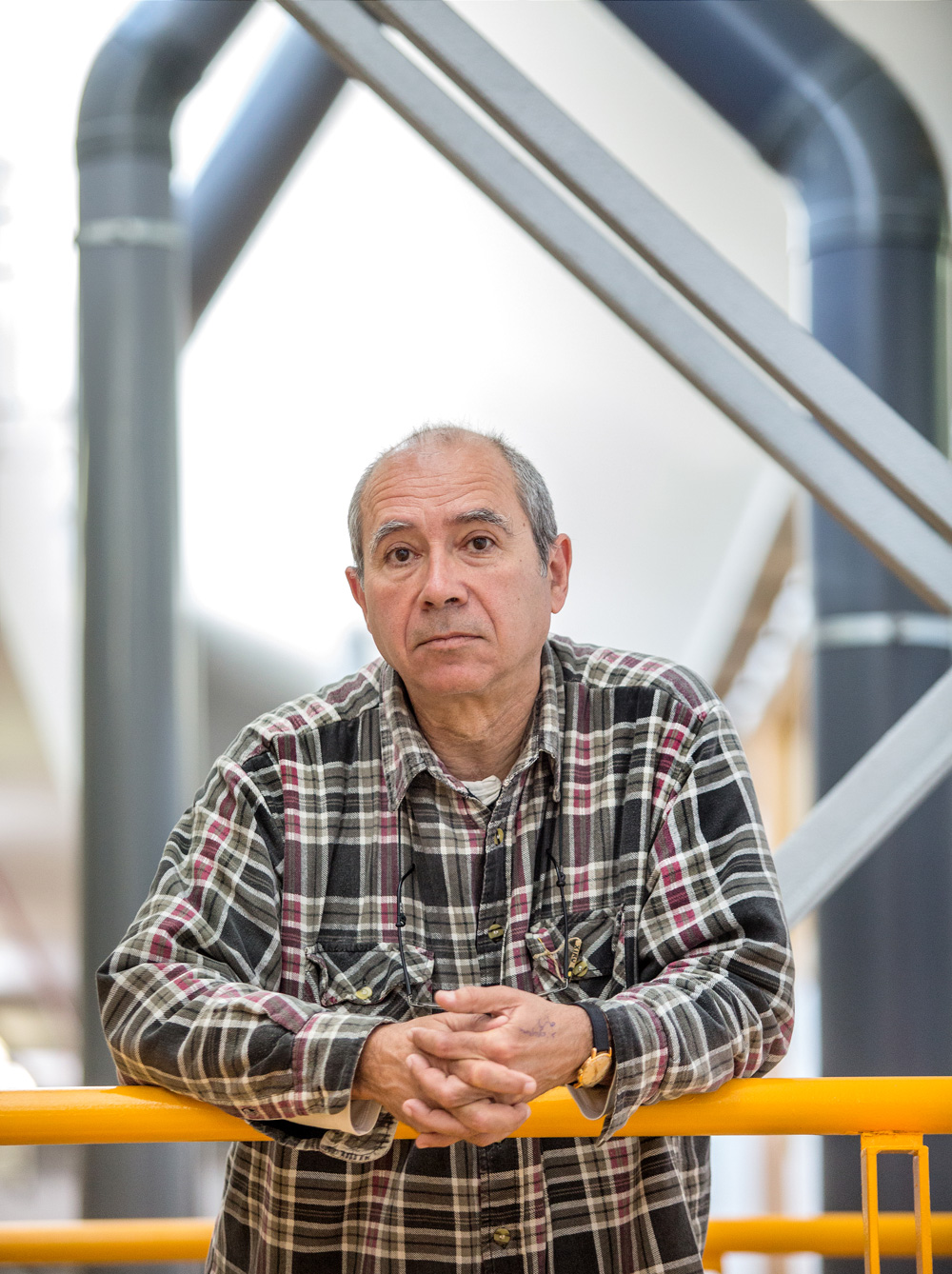 Kepal Altonaga biologo eta idazlea.